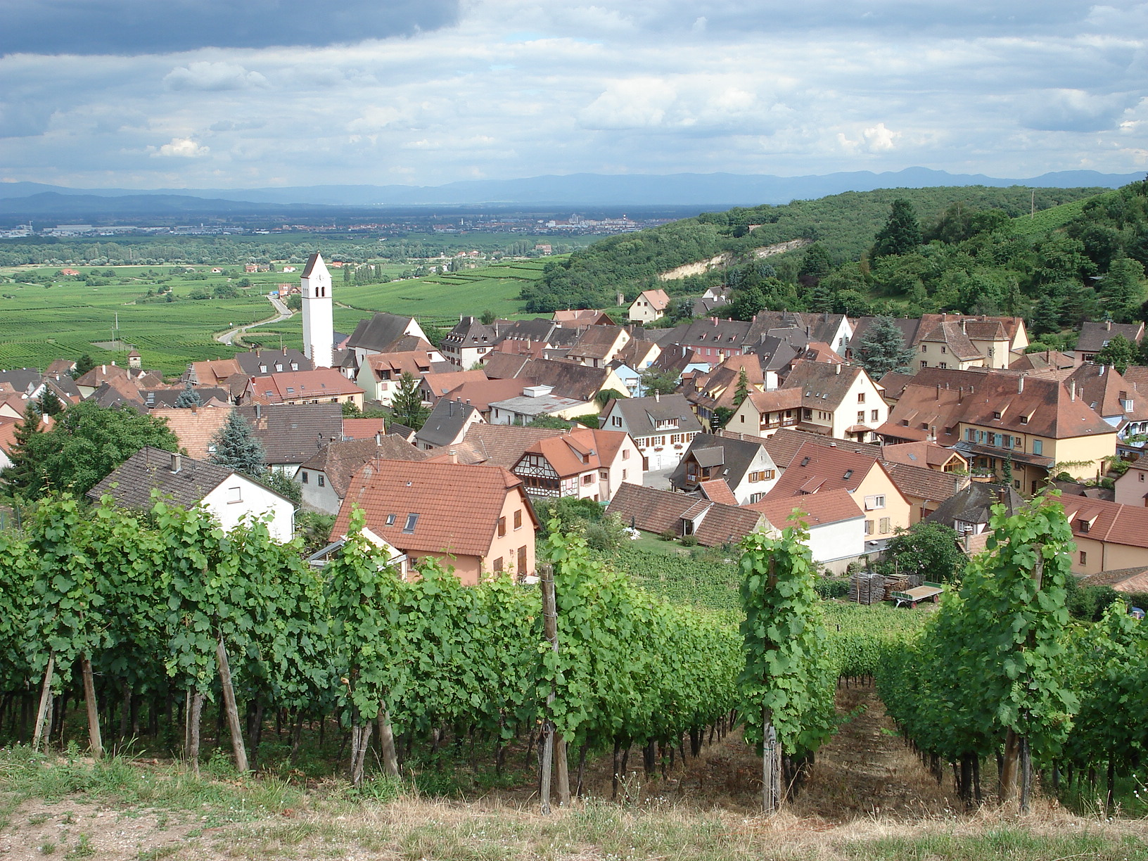 Katzenthal (dép. du Haut-Rhin, Alsace, France): vue générale du village, avec l'église Saint-Nicolas. À l'avant-plan: vignobles du Wineck. Au second plan, à droite, contre le bord de la photo, la colline du Neuberg; juste derrière, portant la marque d'une tranchée blanche, la colline boisée du Dorfbourg. À l'arrière-plan, la plaine d'Alsace, où s'étire, en partie masquée par la colline du Dorfbourg, l'agglomération de Colmar. Tout au loin, à gauche, les montagnes de la Forêt-Noire; à droite, les Alpes bernoises.